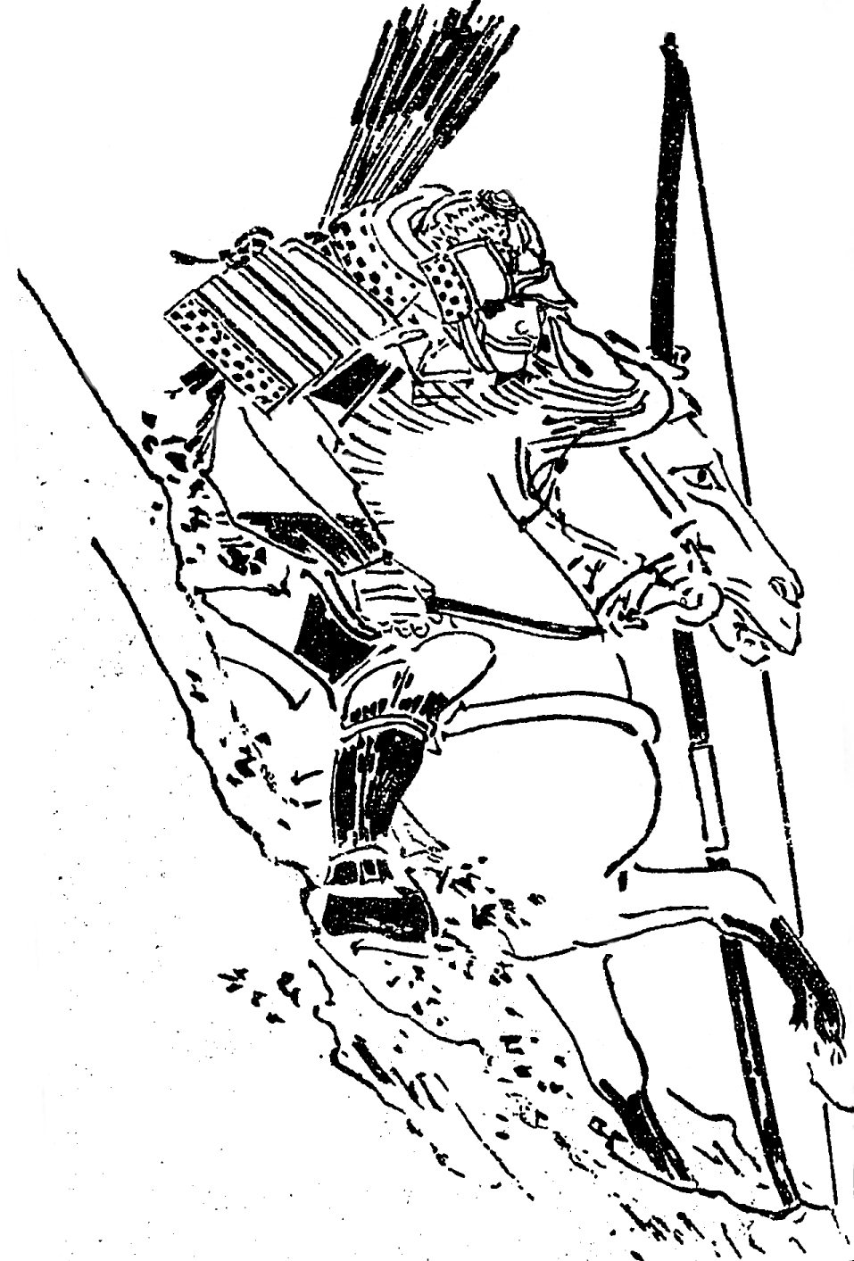 佐原義連。平安時代末期 - 鎌倉時最初期の武将。／江戸時代『前賢故実』より。画：菊池容斎